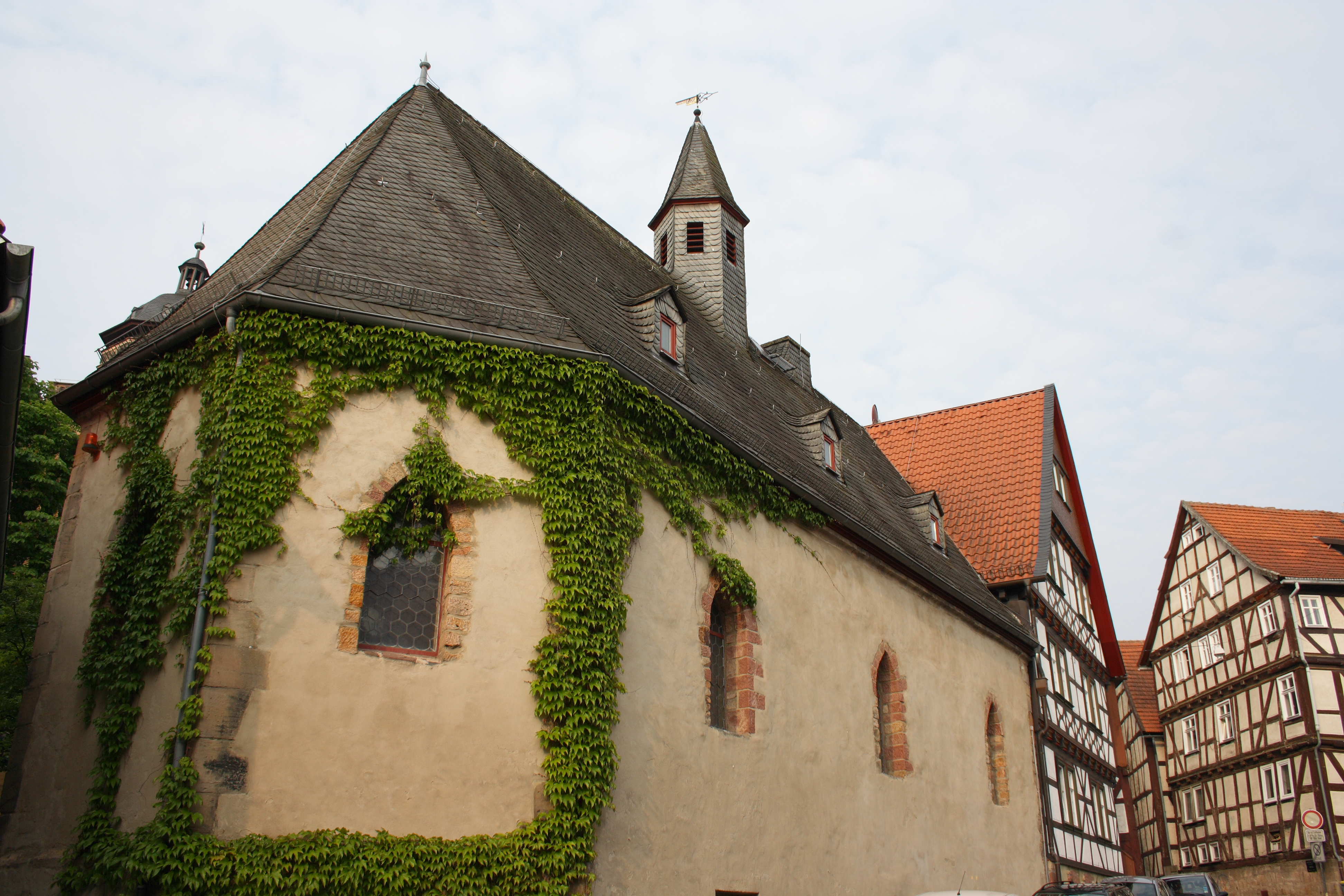 Beinhaus in Alsfeld im Vogelsbergkreis (Hessen), Kirchplatz 6